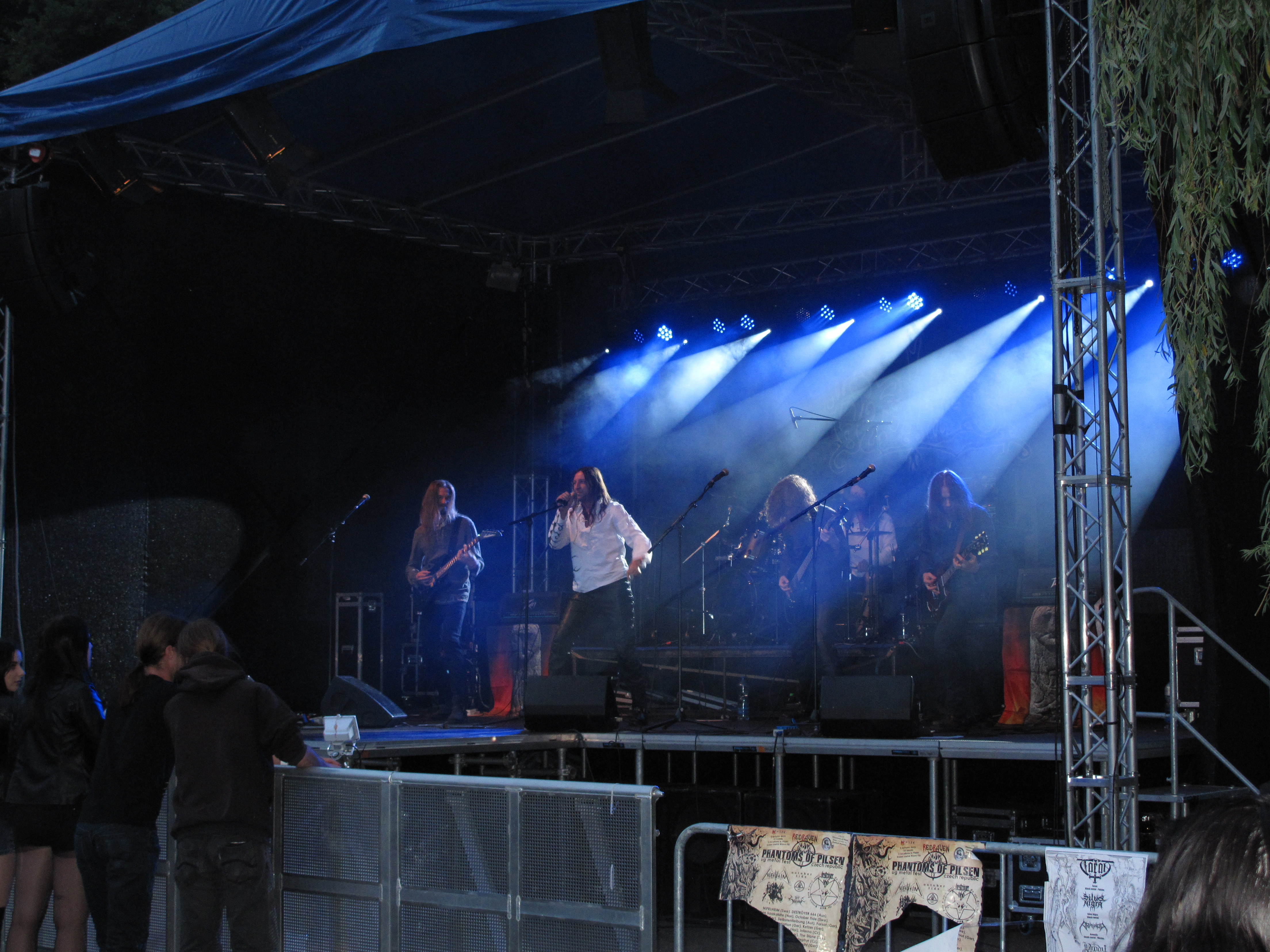 Skupina Obtest na festivalu Hell Fast Attack